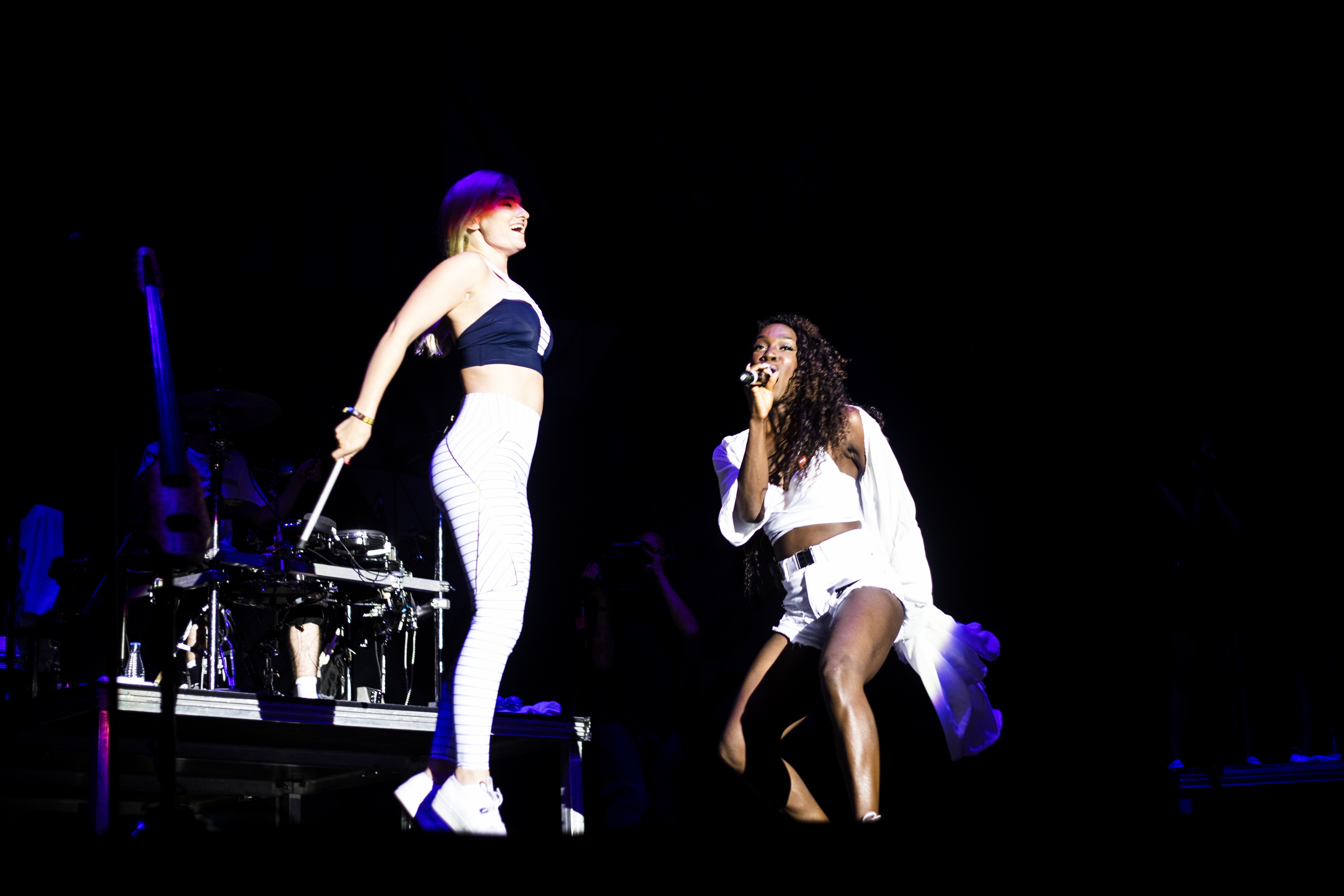 FIB 2015